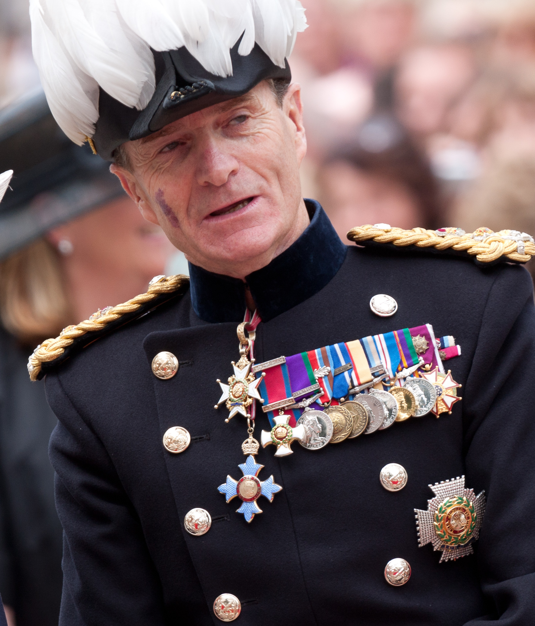 General Sir John McColl.